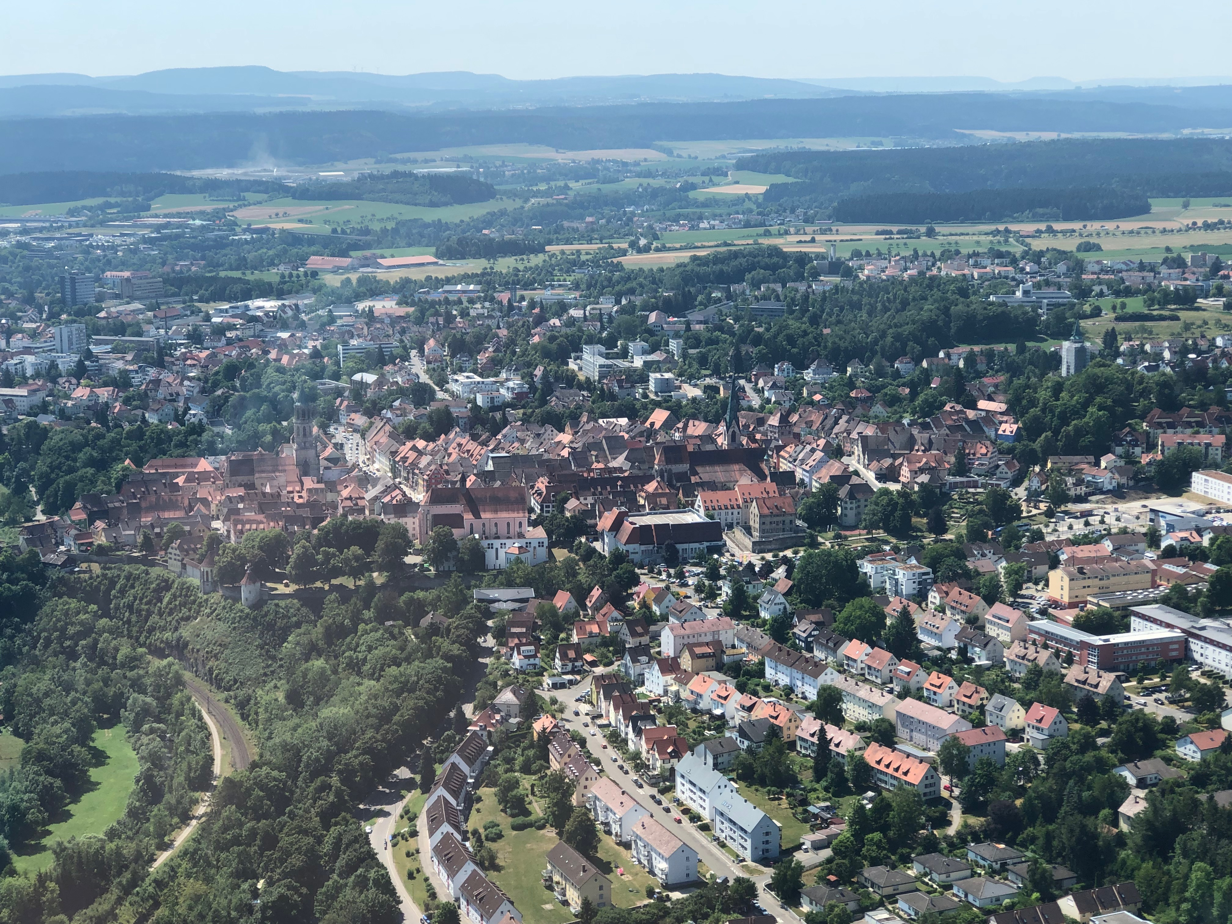 Altstadt von Rottweil vom Thyssenkrupp Testturm aus.